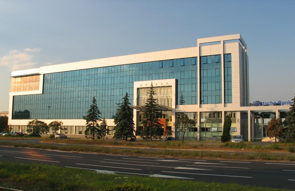 Niegdyś biurowiec firmy Redan w Łodzi ul. Aleksandrowska 67/93